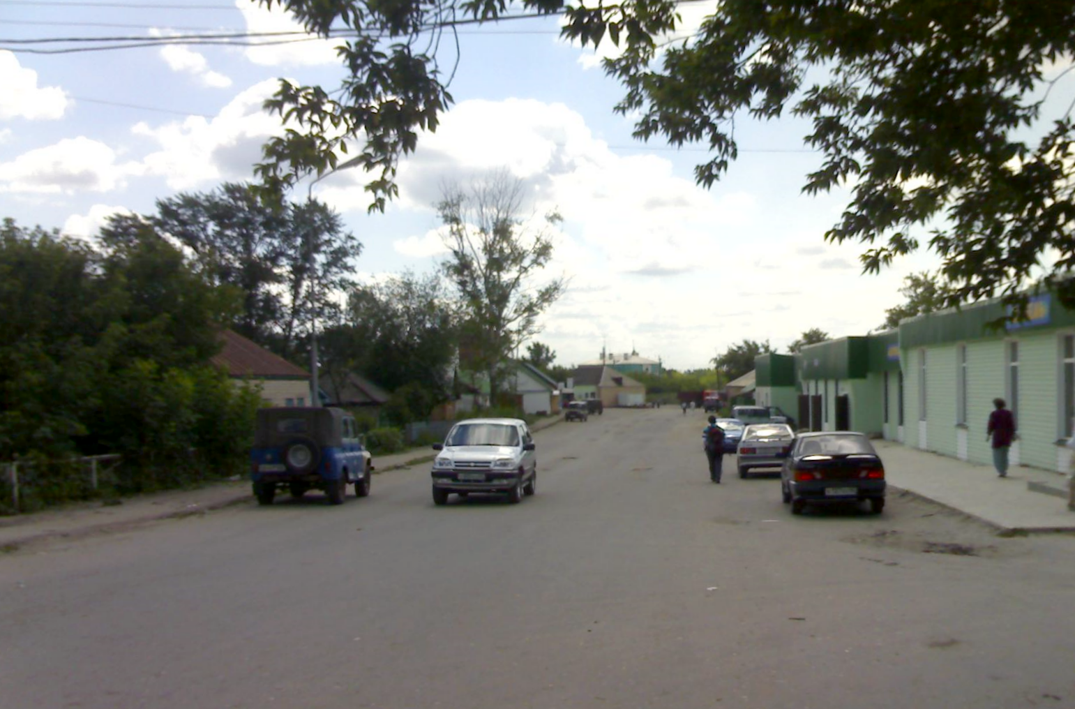 2007 год.